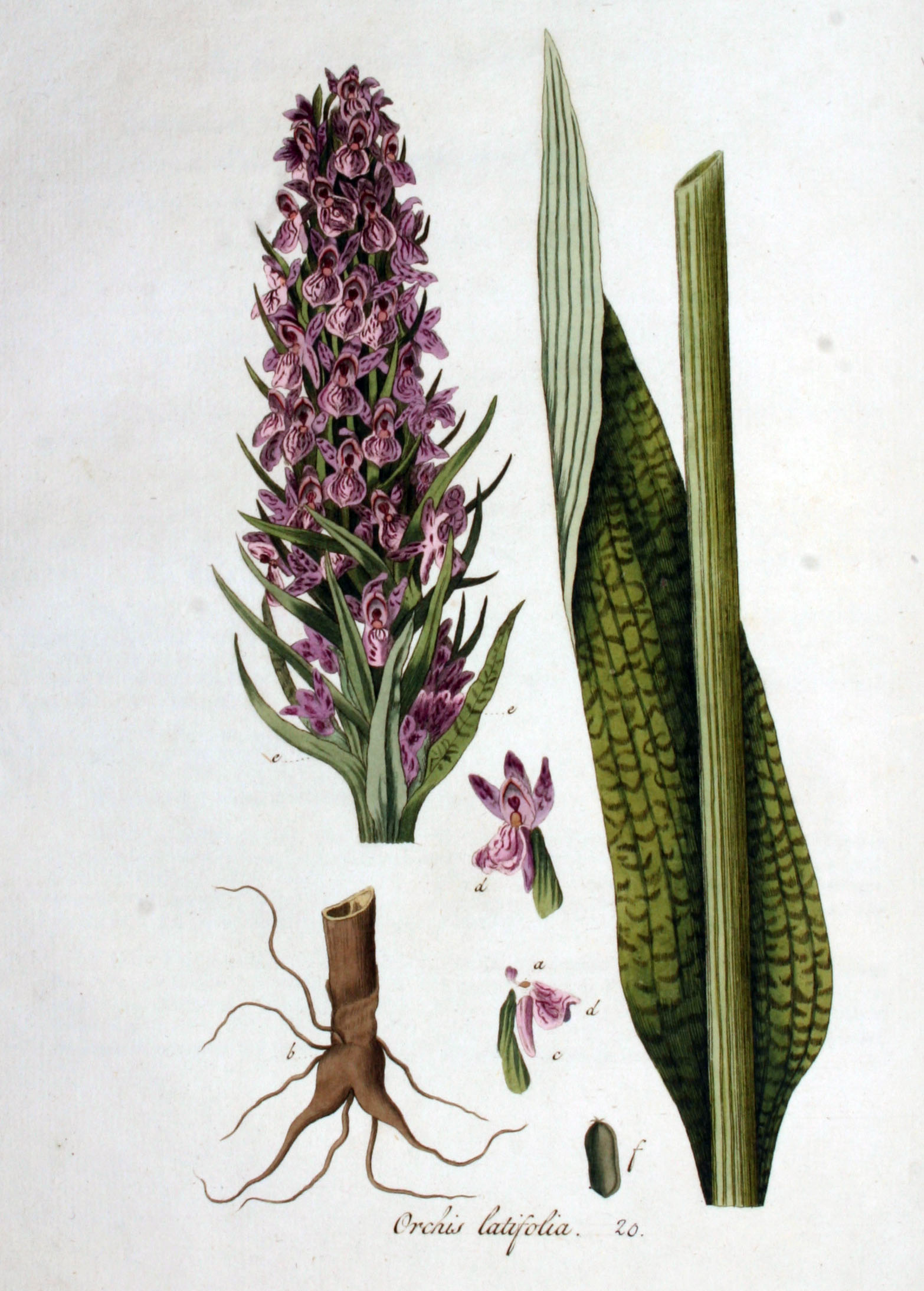 Dactylorhiza majalis (Reichenb.) P.F. Hunt & Summerh. (Syn. Orchis latifolia L.)